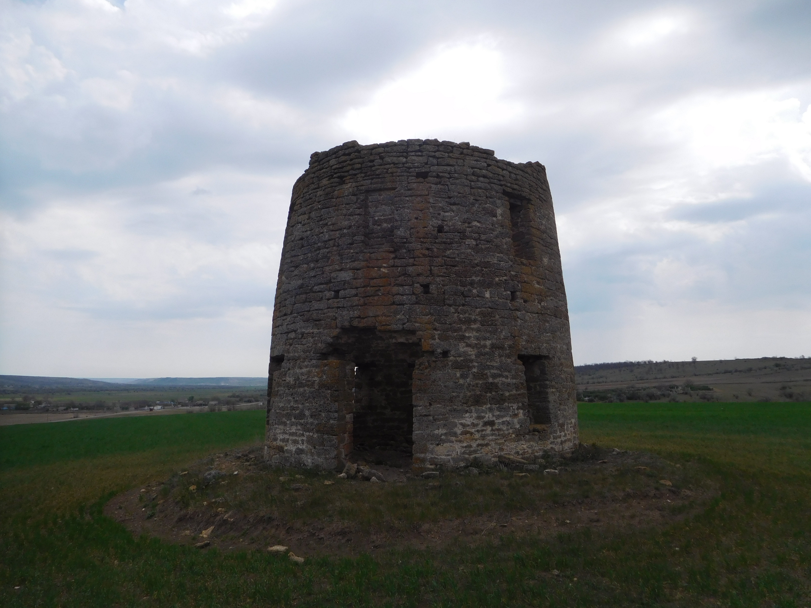 с. Адамівка, Іванівський район, Одеська область